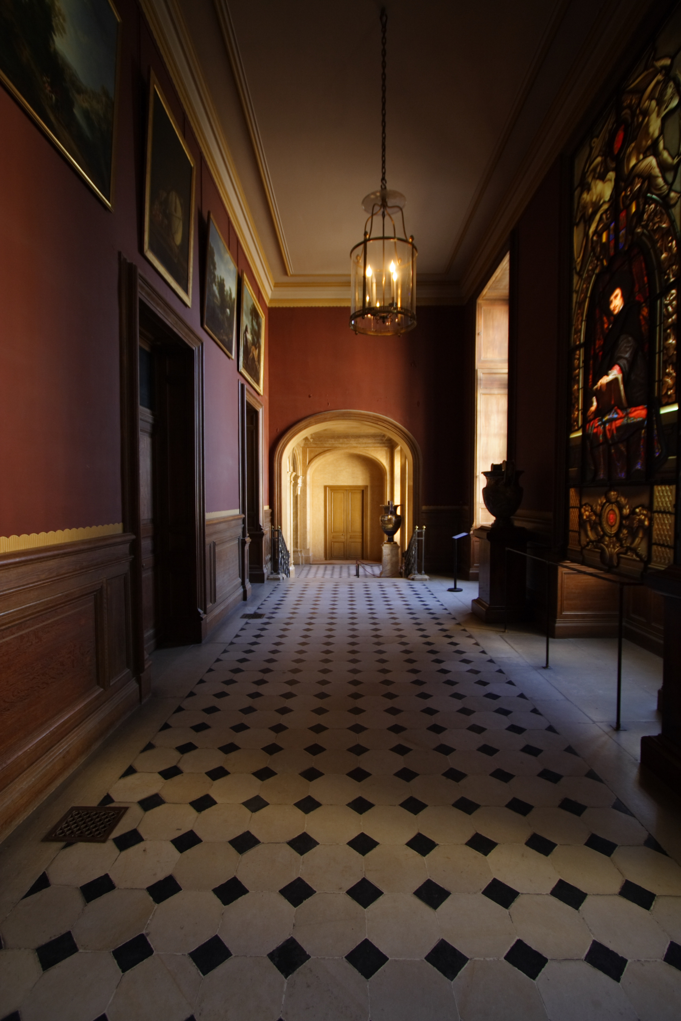 Vorzimmer der Prunkgalerie im Schloss Fontainebleau